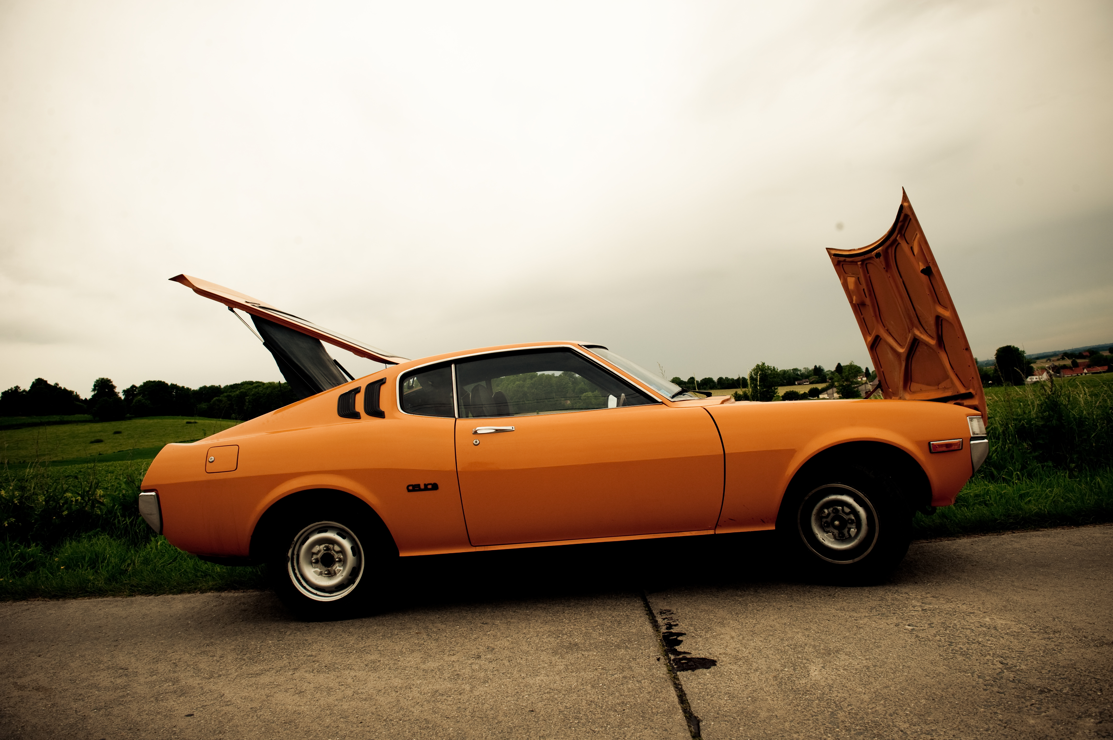 Toyota Celica Liftback ST 1976 Modèle TA28 - 1600cm³ - 89ch